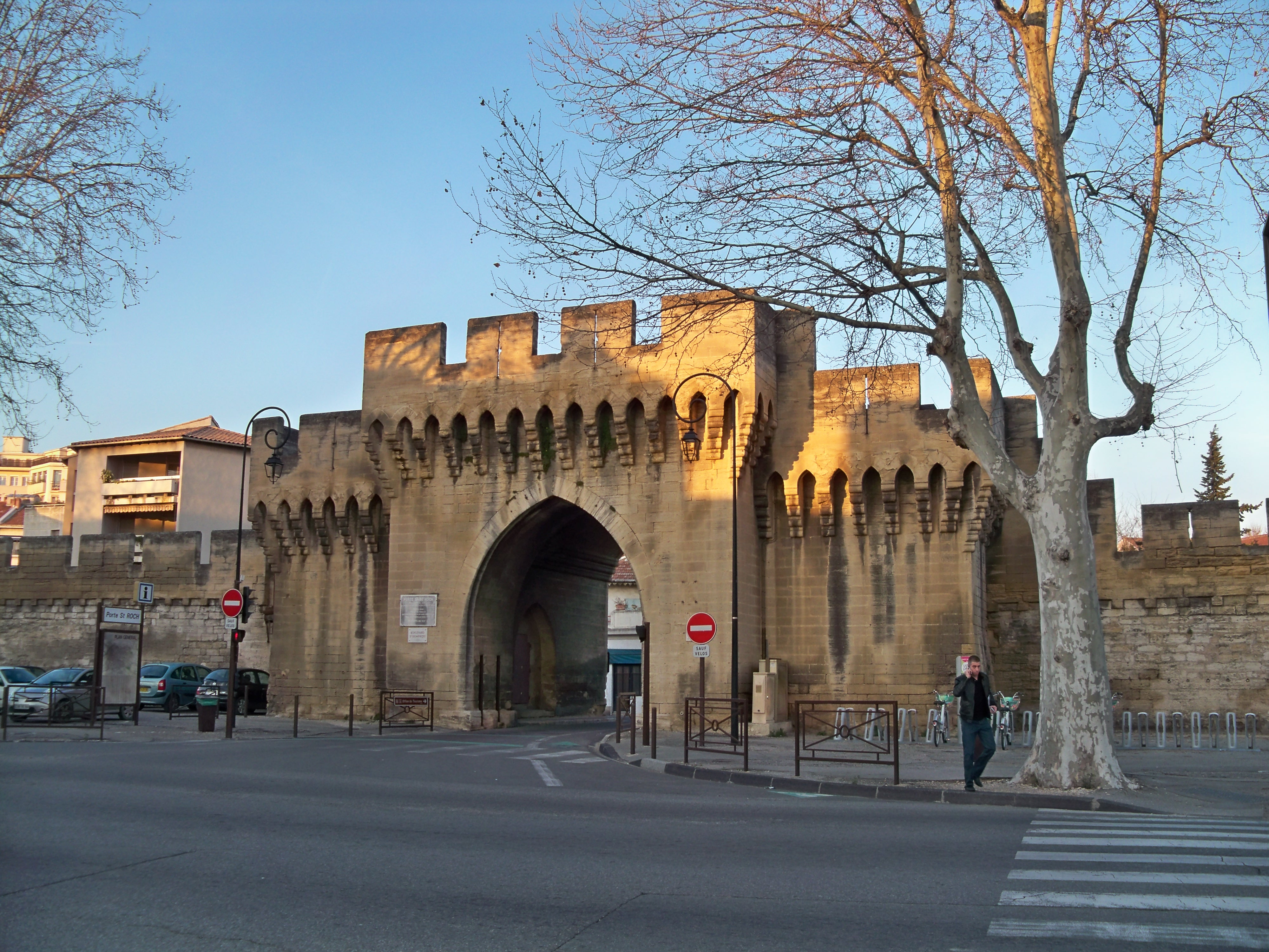 Porte Saint Roch des remparts d'Avignon, Vaucluse, France